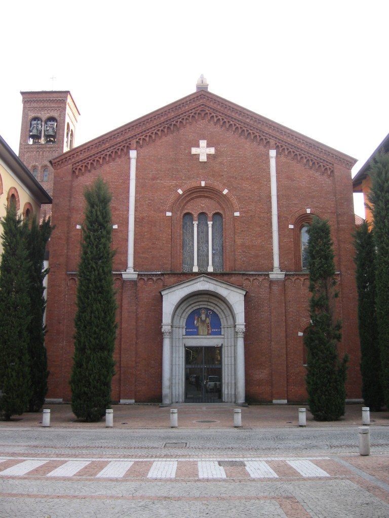 Abbazia San Bnedetto - Seregno